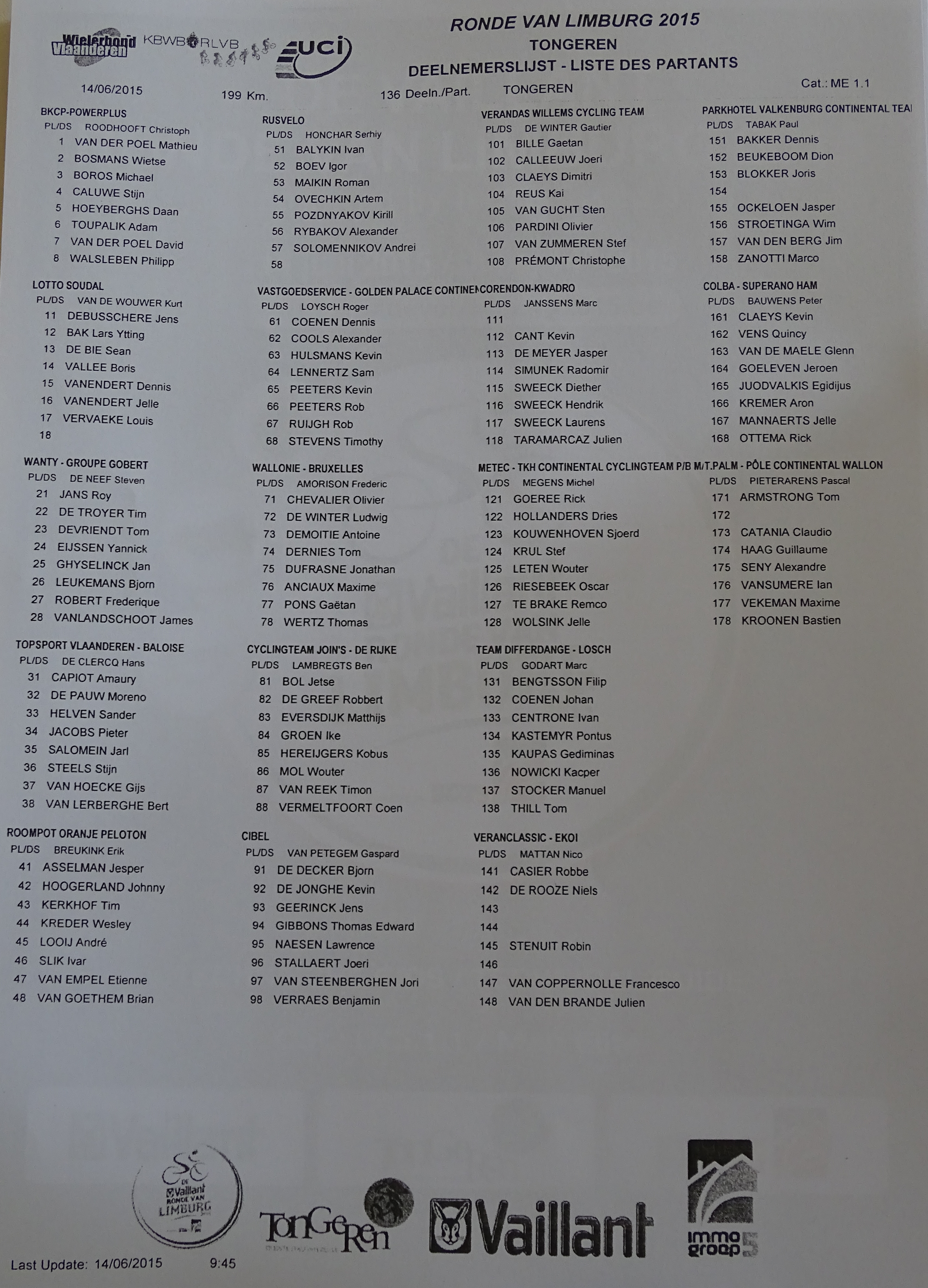 Reportage réalisé le dimanche 14 juin à l'occasion du départ et de l'arrivée du Tour du Limbourg 2015 à Tongres, Belgique.